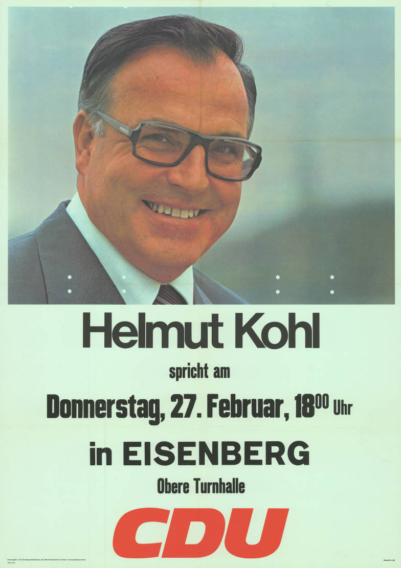 Helmut Kohl spricht ... CDU Abbildung: Porträtfoto Plakatart: Ankündigungsplakat Auftraggeber: CDU-Bundesgeschäftsstelle, Abt. Öffentlichkeitsarbeit, Konrad-Adenauer-Haus, Bonn Objekt-Signatur: 10-010 : 425 Bestand: Landtagswahlplakate Rheinland-Pfalz (10-010) GliederungBestand10-18: Landtagswahlplakate Rheinland-Pfalz (10-010) » CDU Lizenz: KAS/ACDP 10-010 : 425 CC-BY-SA 3.0 DE